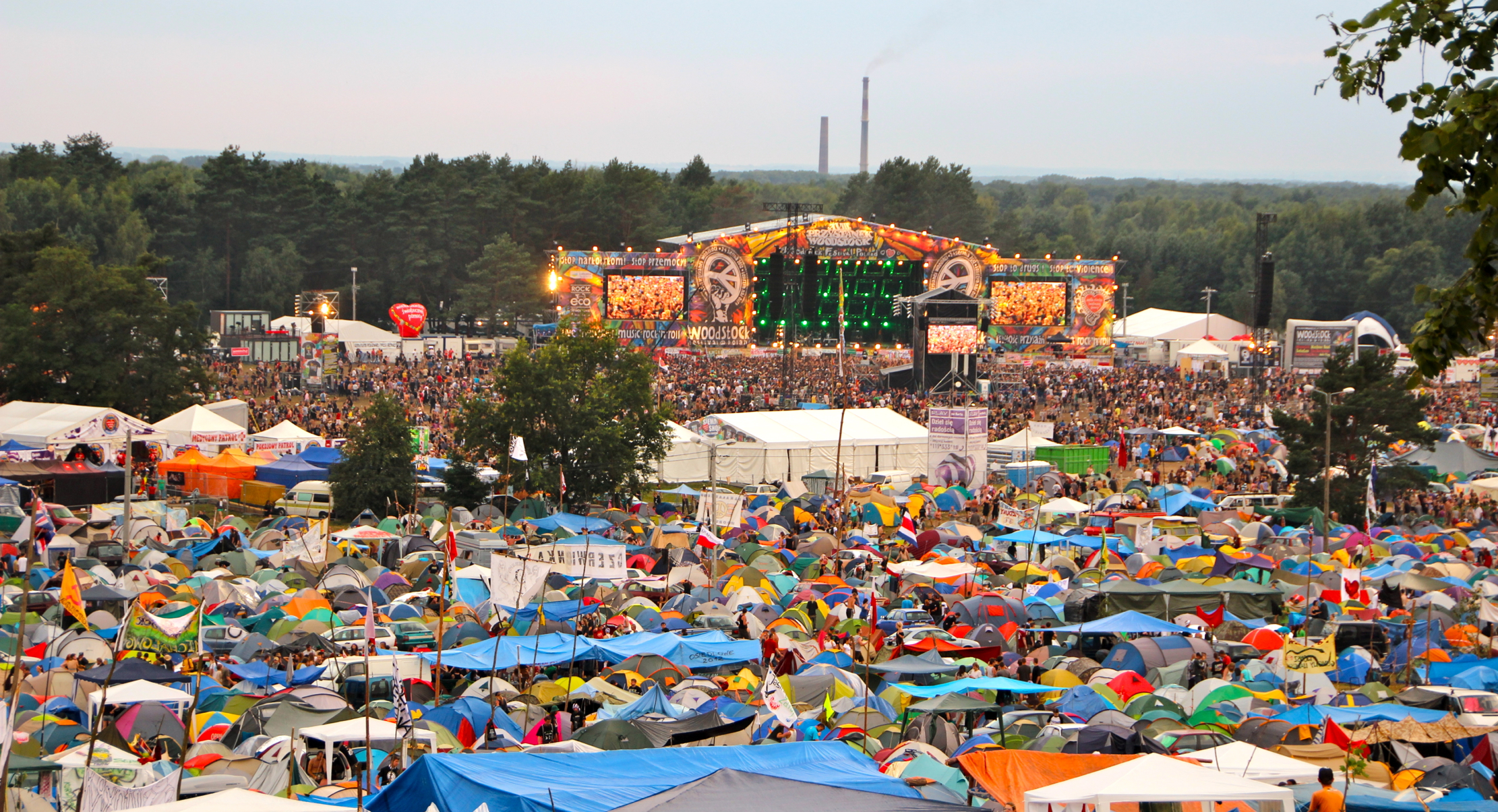 Przystanek Woodstock w 2012 r.